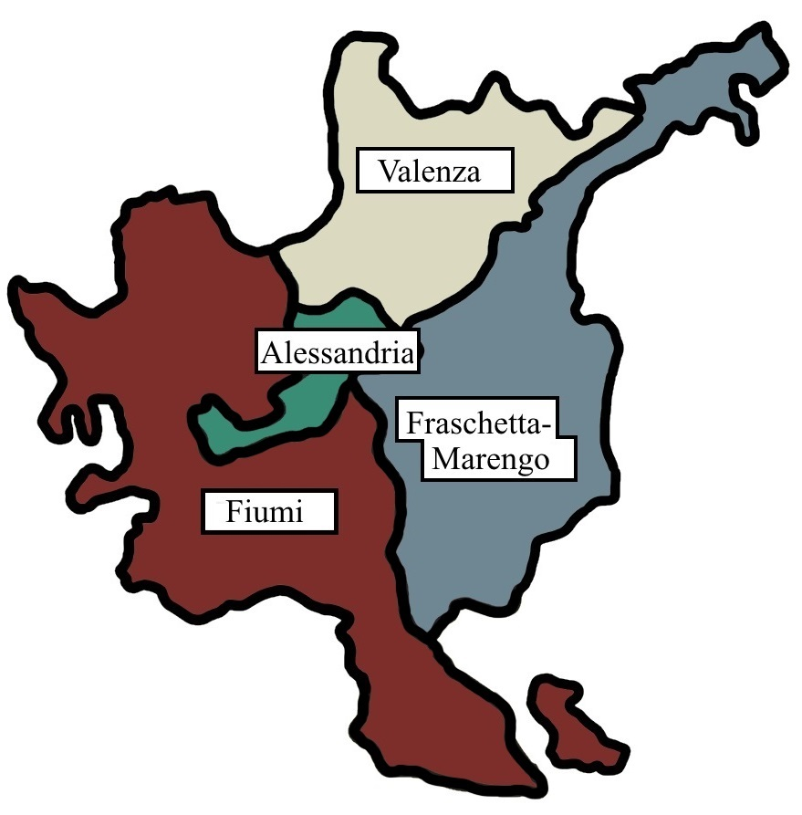 Mappa dei vicariati della diocesi di Alessandria